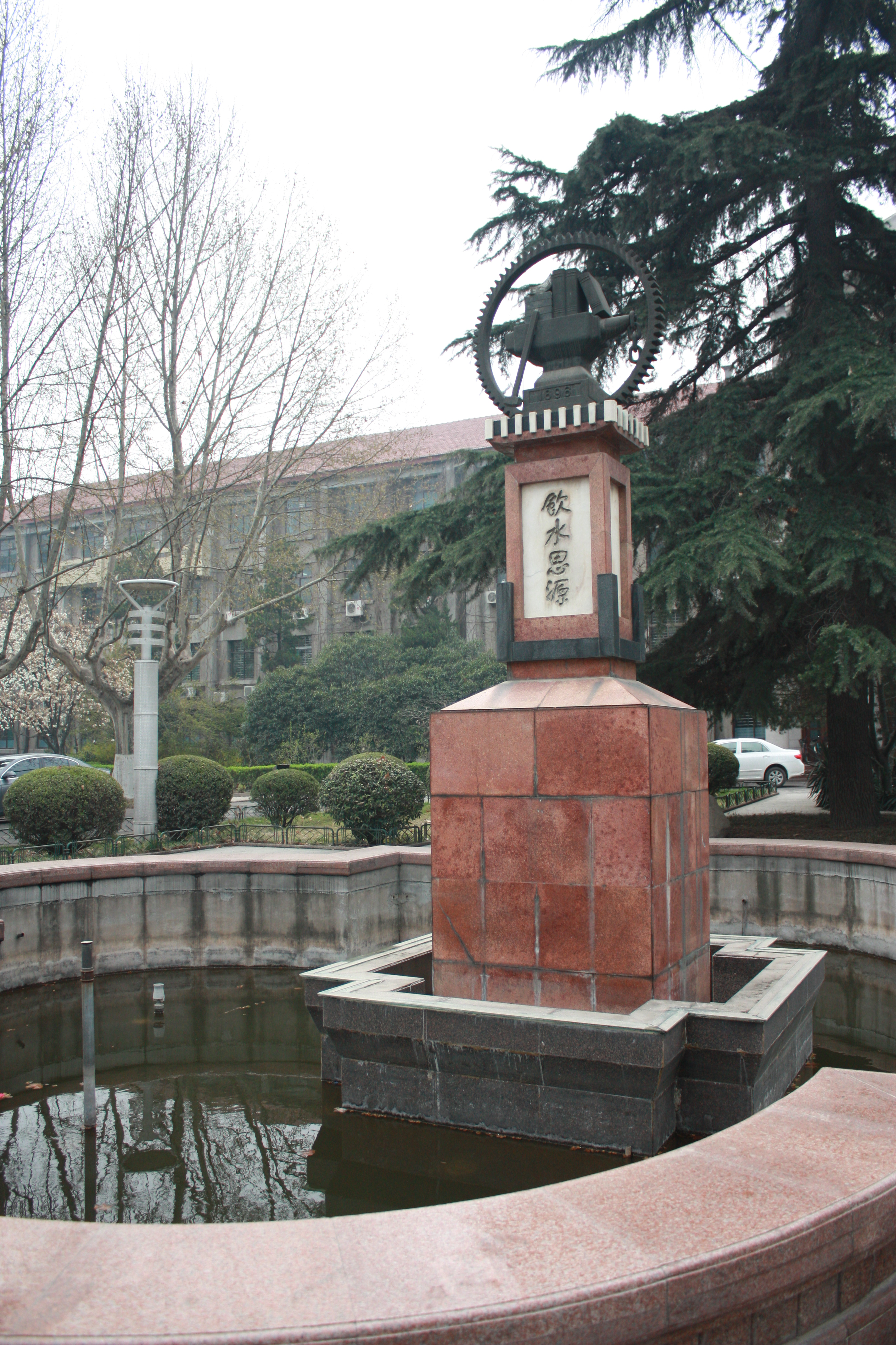 西安交通大学兴庆校区饮水思源